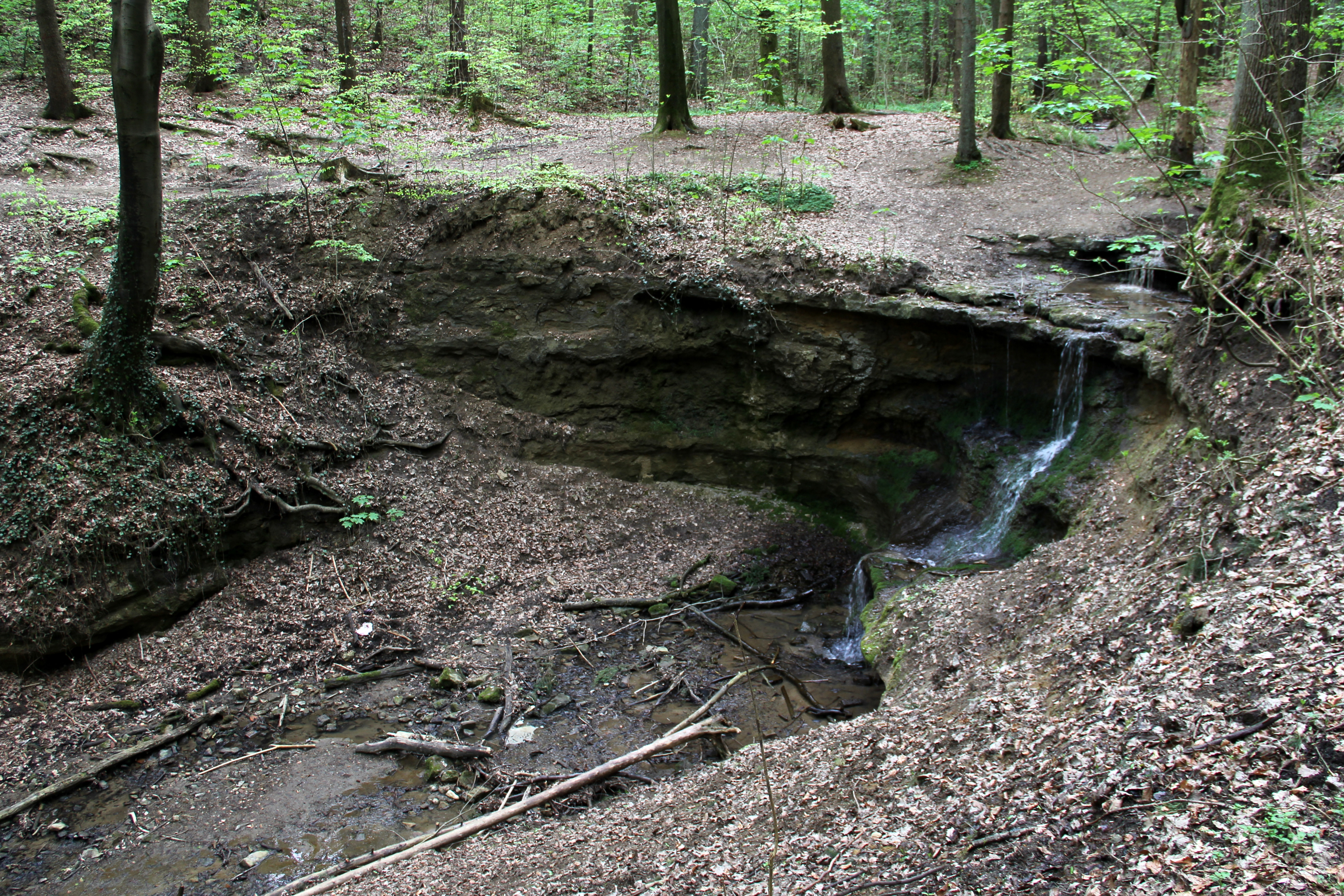 Klingender Wasserfall